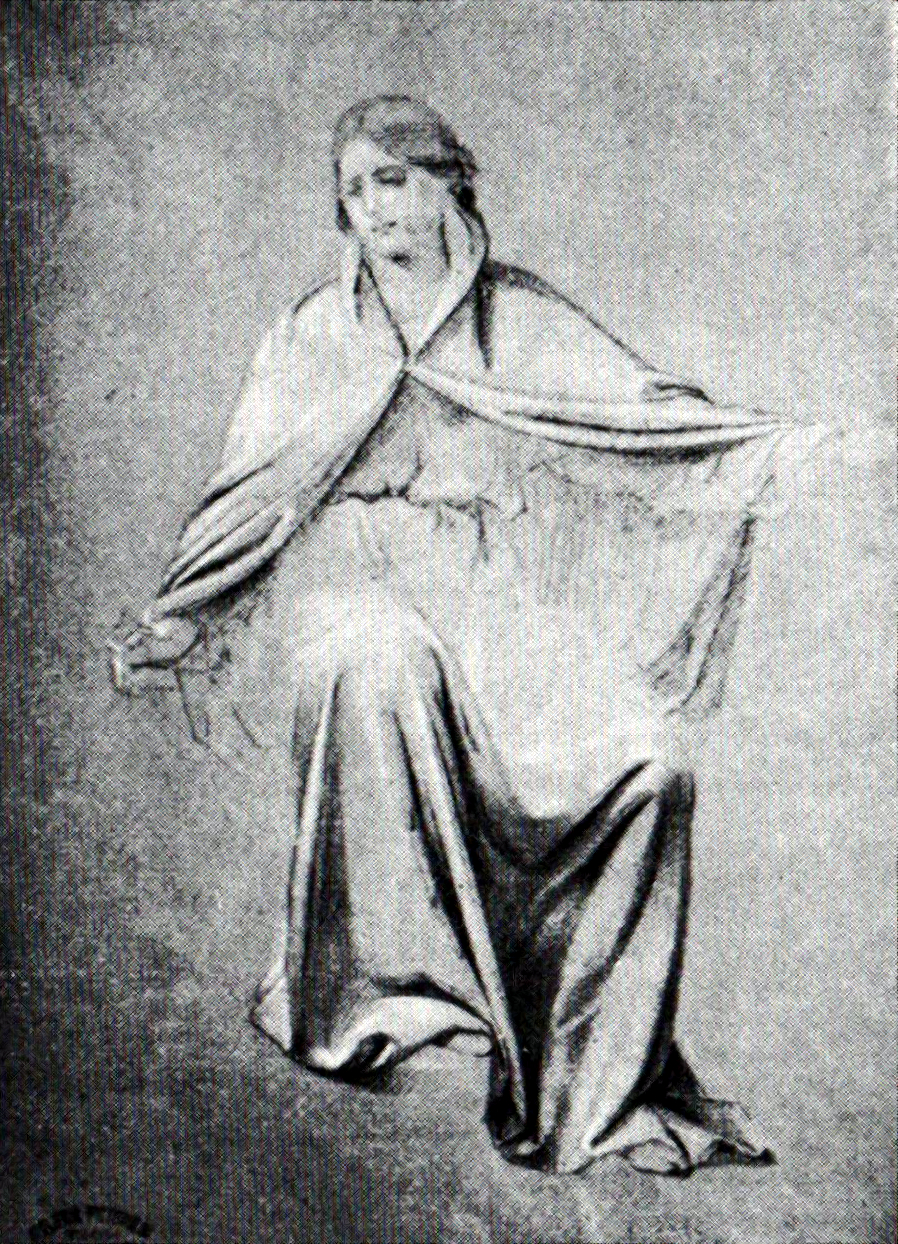 Gheorghe Tattarescu - Studiu de falduri, desen în cretă, 0,25x0.20m - Muzeul Gheorghe Tattarescu